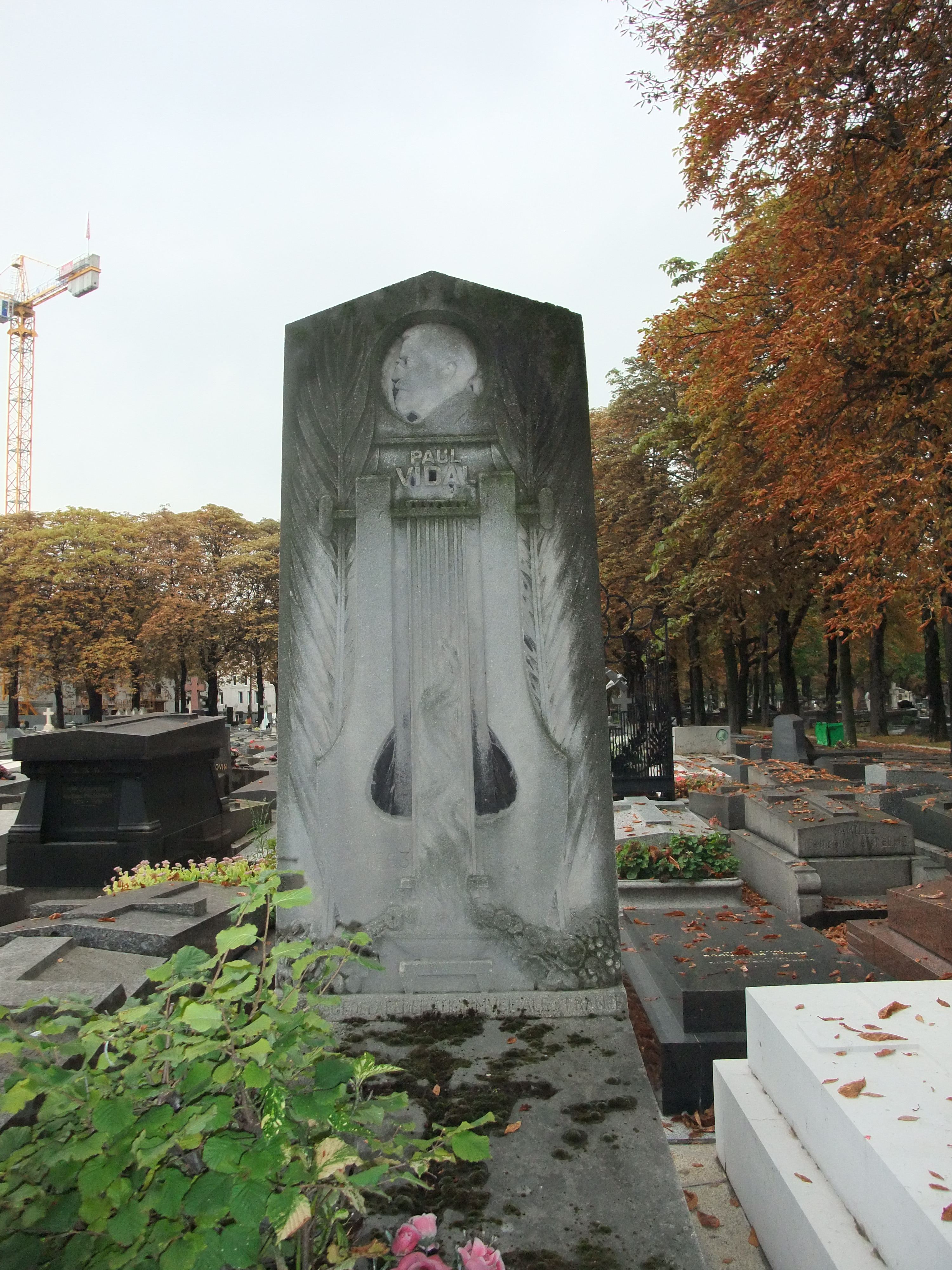 tombe de Vidal à Batignolle